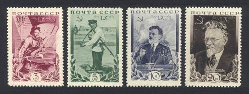 Серия из 4-ёх почтовых марок СССР - Калинин Михаил Иванович, Герой Социалистического Труда